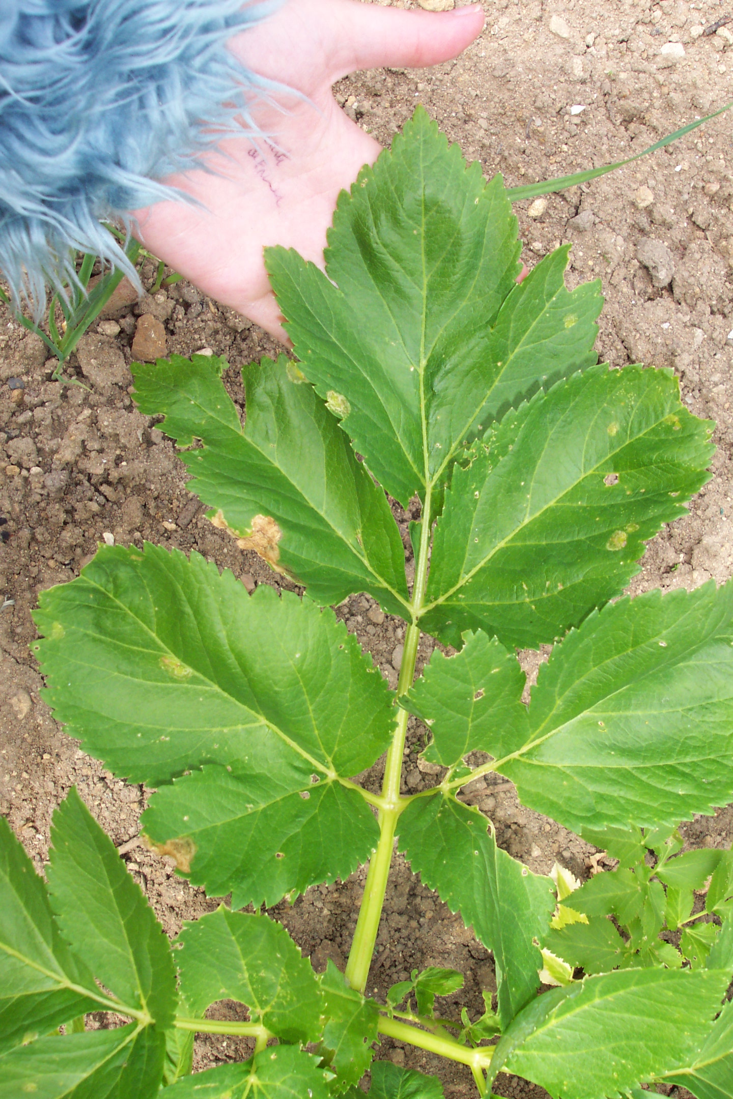 angélique à confire - Angelica archangelica